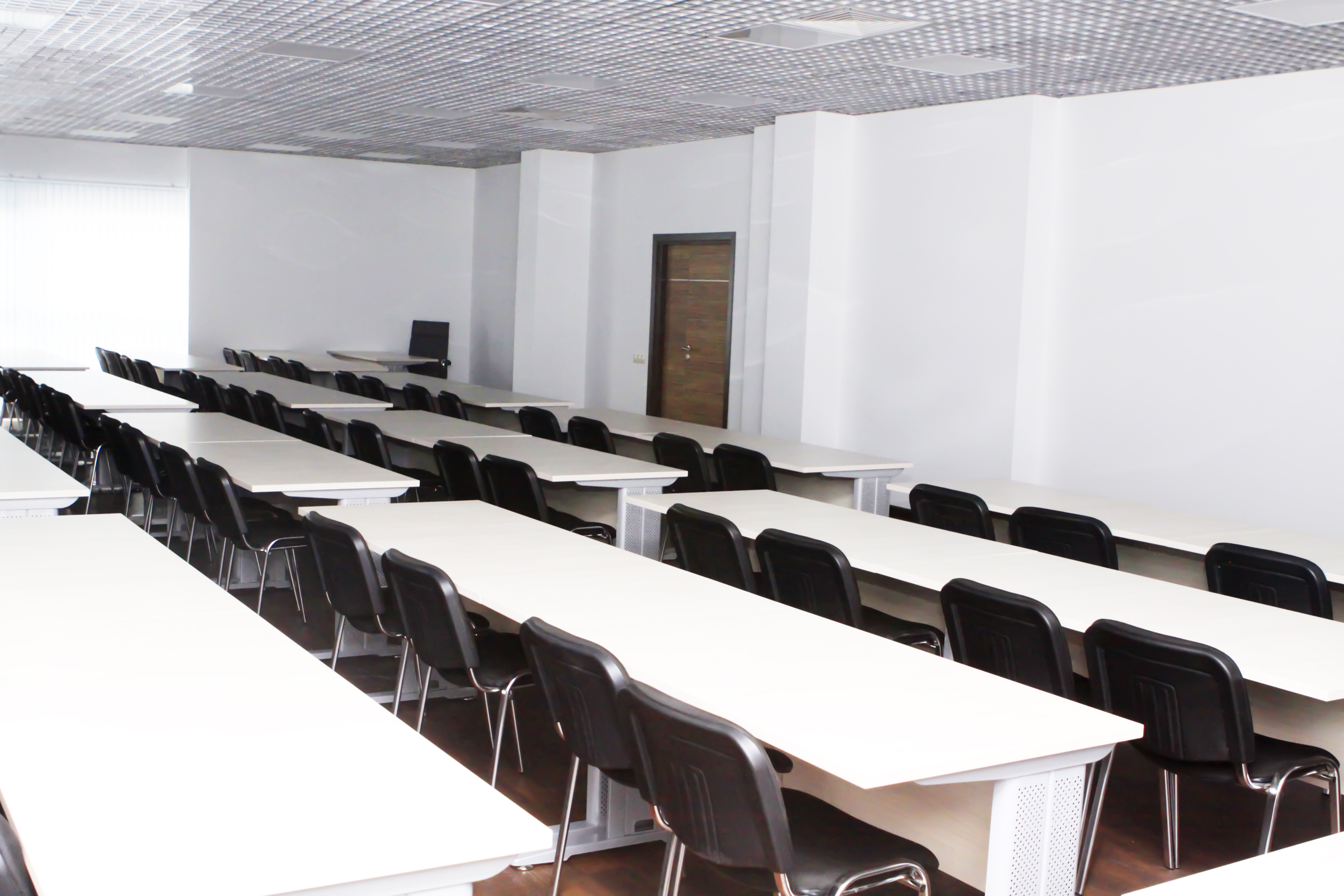 Мытищи